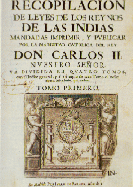 El primer libro de la Cédula Real sobre la Recopilación de las Leyes de Indias publicada en 1980 por la monarquía hispánica por Carlos II.